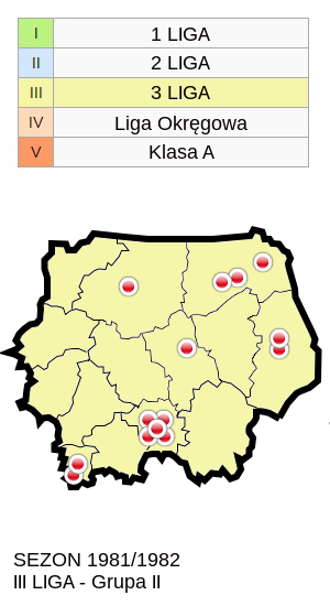 Jagiellonia w sezonie 1981/82 - mapa